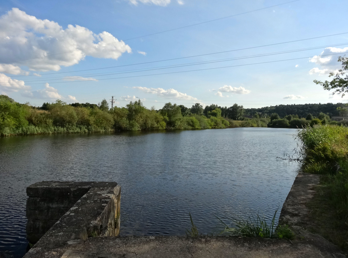 Ujęcie wody wiślanej na osiedlu Łęgnowo dla Zakładów Chemicznych Zachem w Bydgoszczy